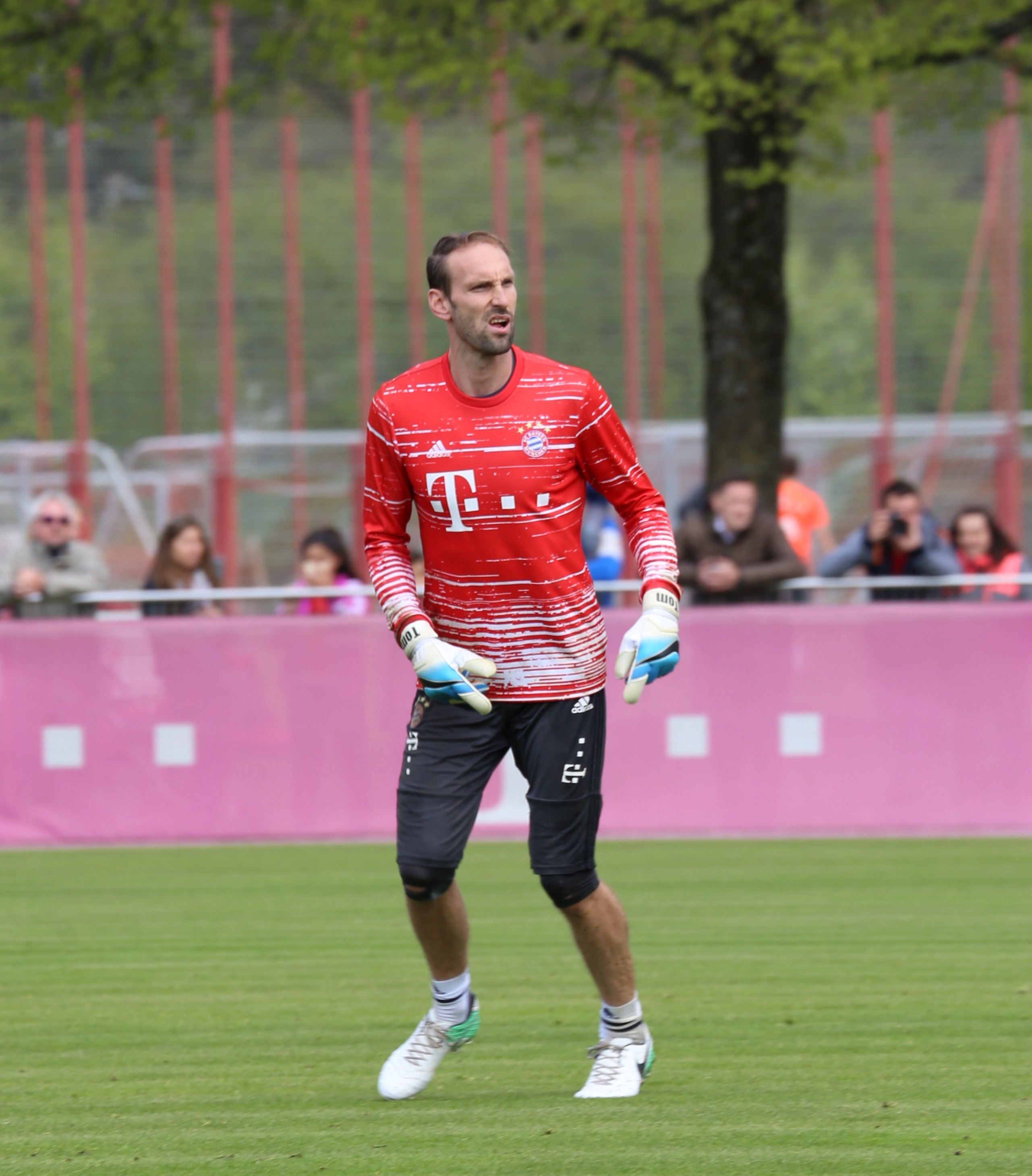 Tom Starke, am 3. Mai 2017 beim Training auf dem Gelände des FC Bayern München